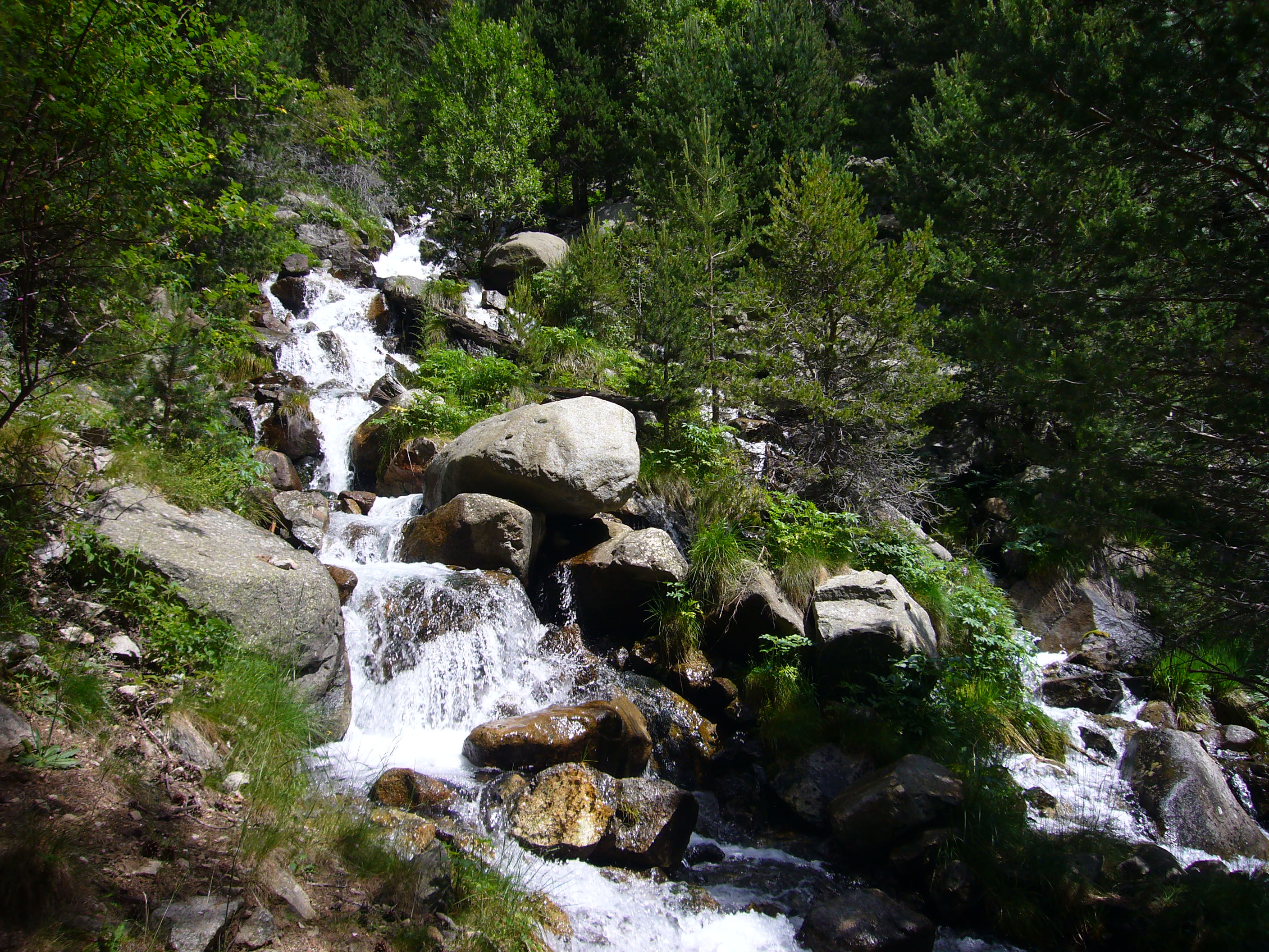 Barranc de Sarradé; la Vall de Boí, Alta Ribagorça, Catalunya.